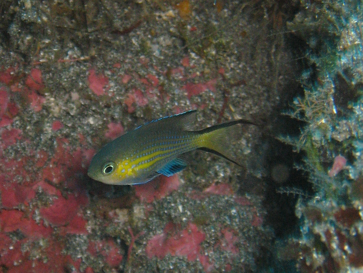 Chromis nigrura sur les côtes de Saint-Gilles-les-bains à la Réunion.